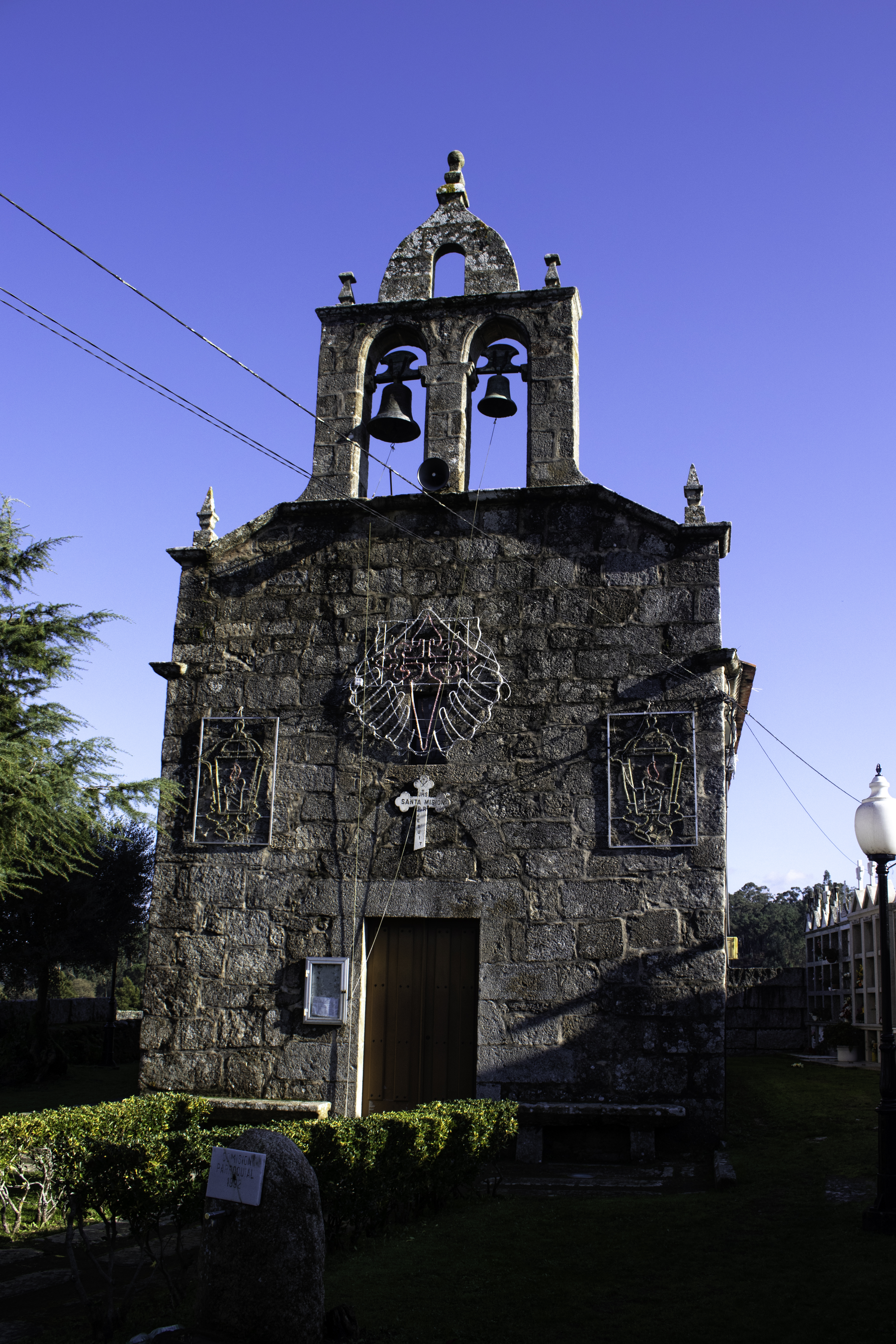 Igrexa de San Fins de Lois, no concello pontevedrés de Ribadumia.